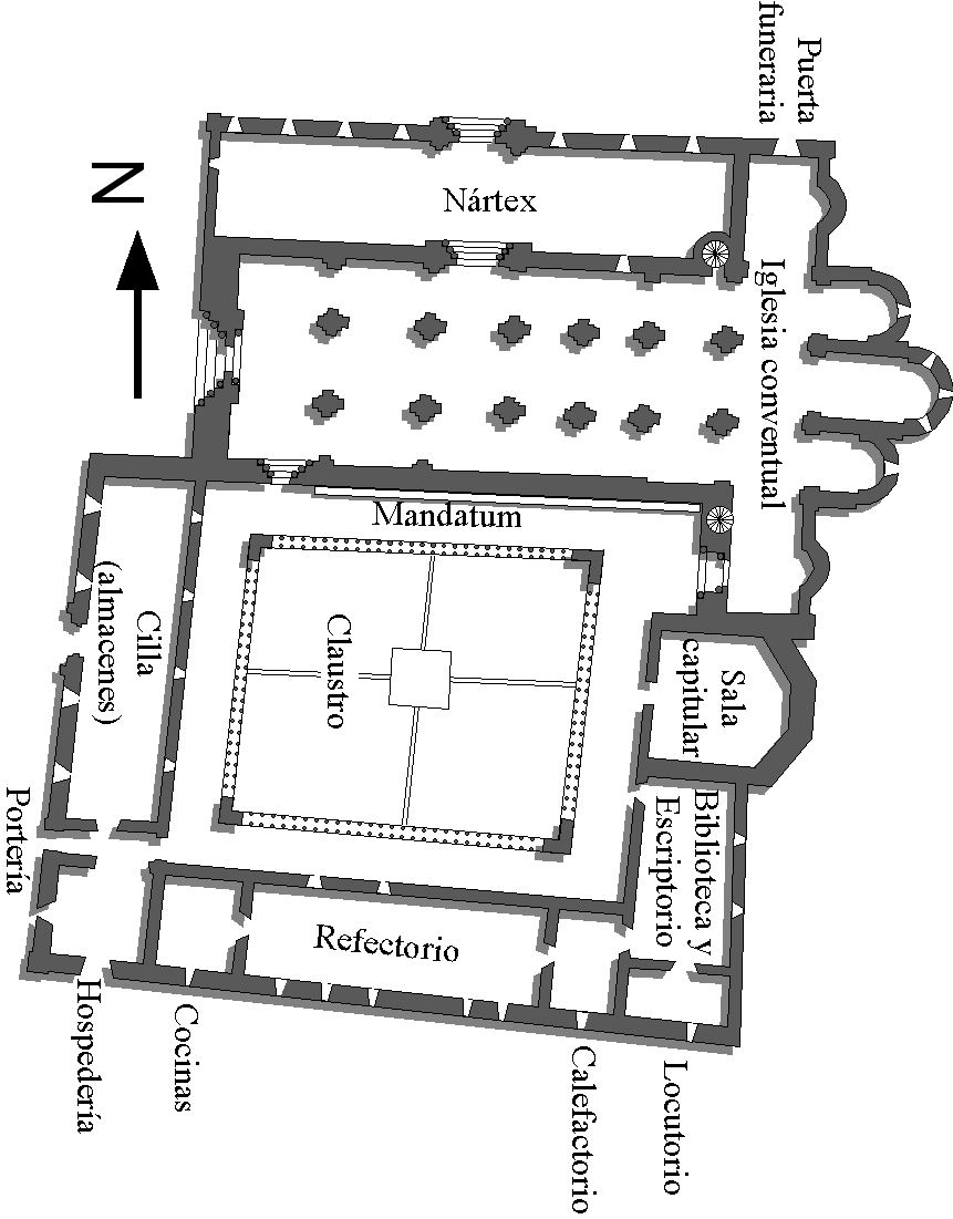 Planta del primitivo monasterio de Santo domingo de silos, tal como sería en el siglo XII. Actualmente la iglesia románica ha desaparecido, sustituida por otra más modernas, así como otras estancias que rodean el claustroRomanesque architecture